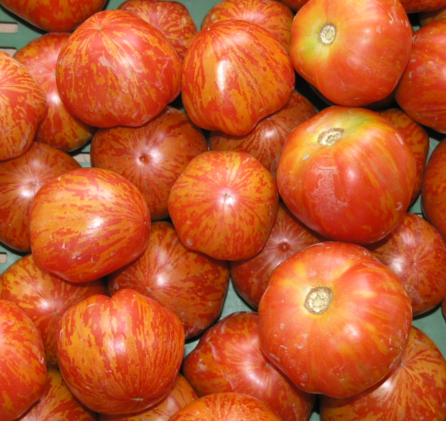 Tomatensorte rot getiegert